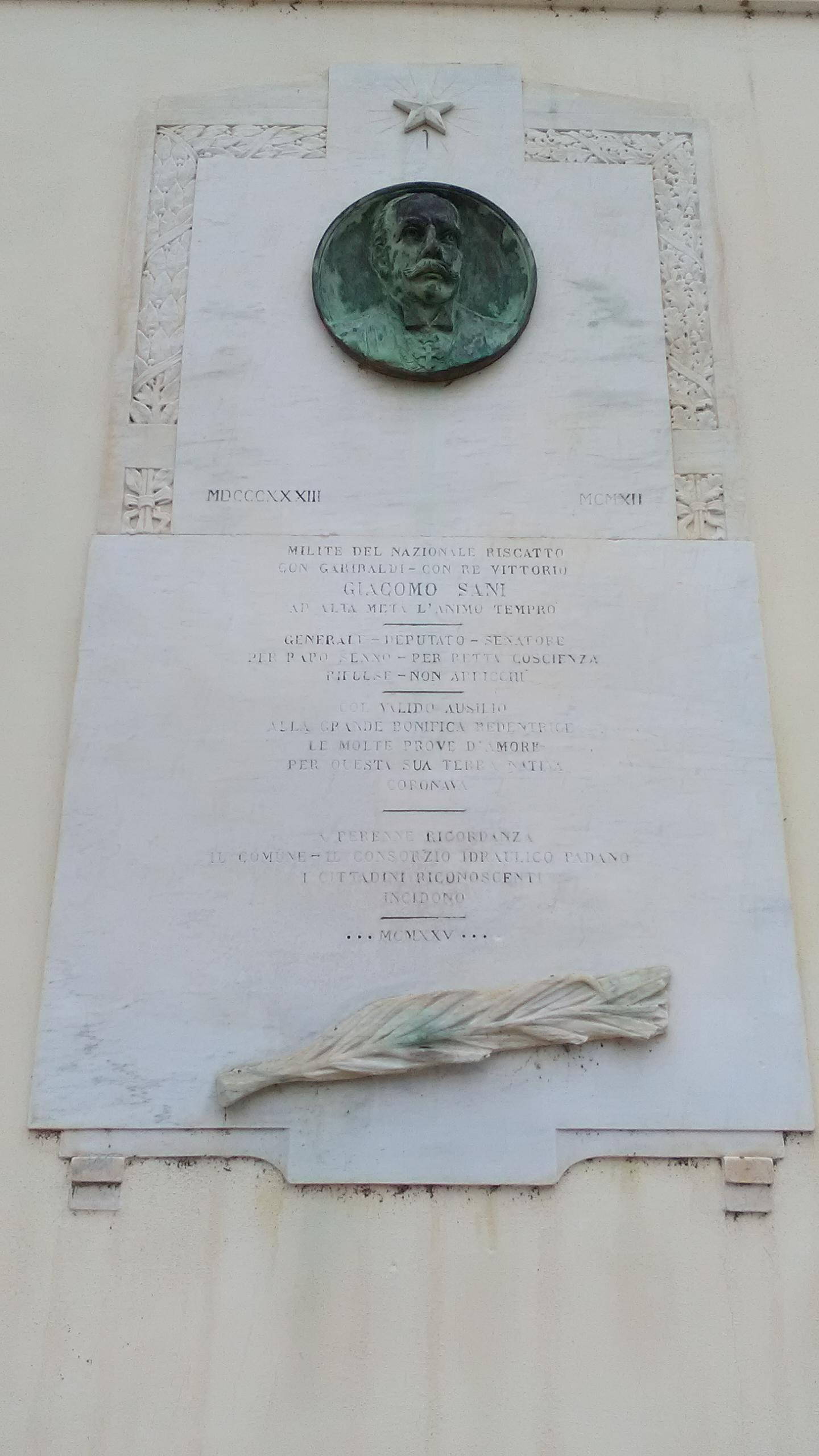 Lapide ad Giacomo Sani (municipio di Catelmassa)